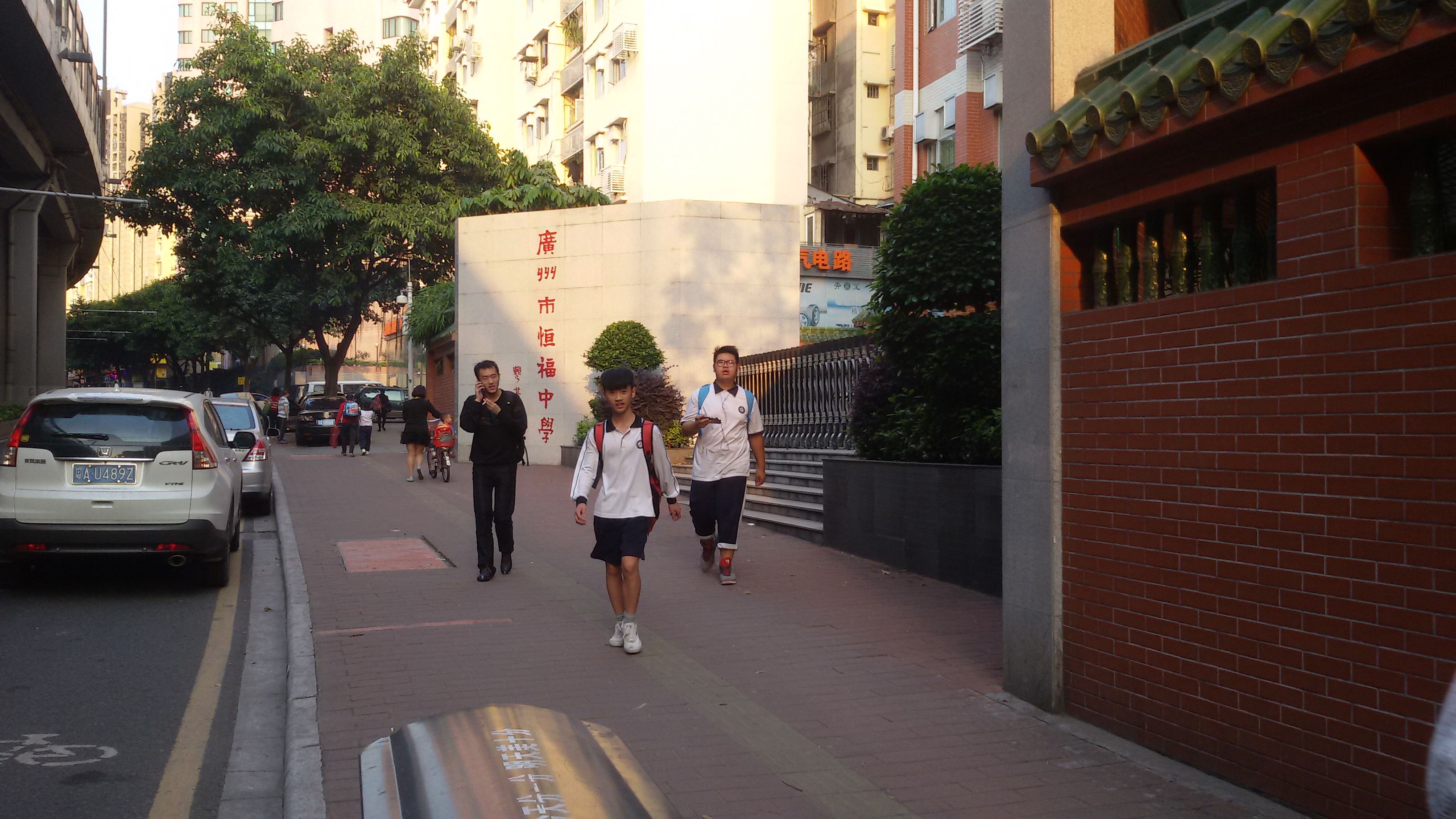 粵語: 廣州市恆福中學嘅高中校區正門附近